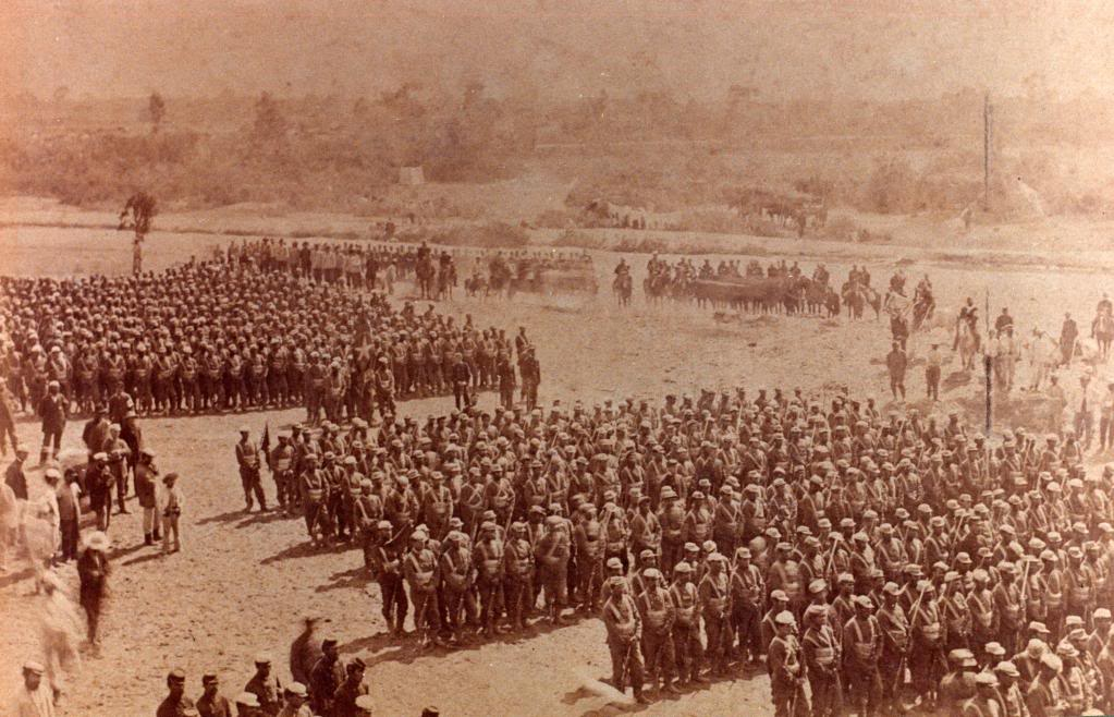 Regimiento 2º de Línea en San Pedro de Lurín, durante la ceremonia de entrega de su estandarte